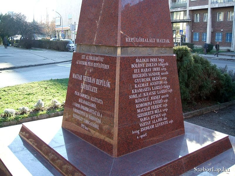 A Magyar Veterán Repülők Szövetségének Pécsi Csoportja a II. világháborúban hősi halált halt magyar repülősök, illetve a feladatuk teljesítése közben elhunyt pilóták emlékére állította ezt a szobrot még 1992-ben. Az emlékmű érdekessége, hogy talapzata a hajdani pécsi repülőtér kifutóján kapott helyet (Pécs, Uránváros)